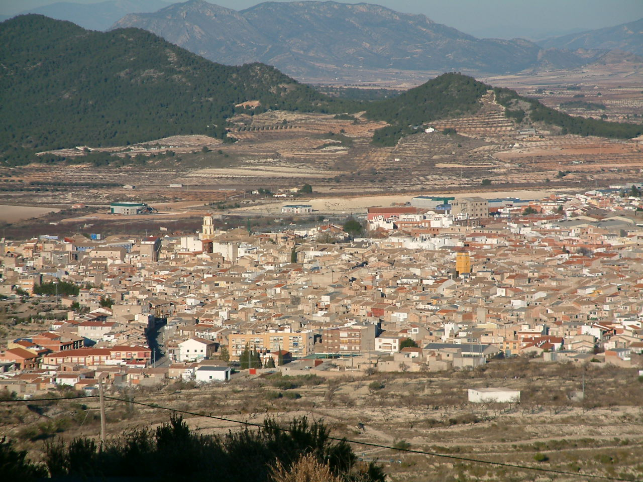 Vista de Bullas